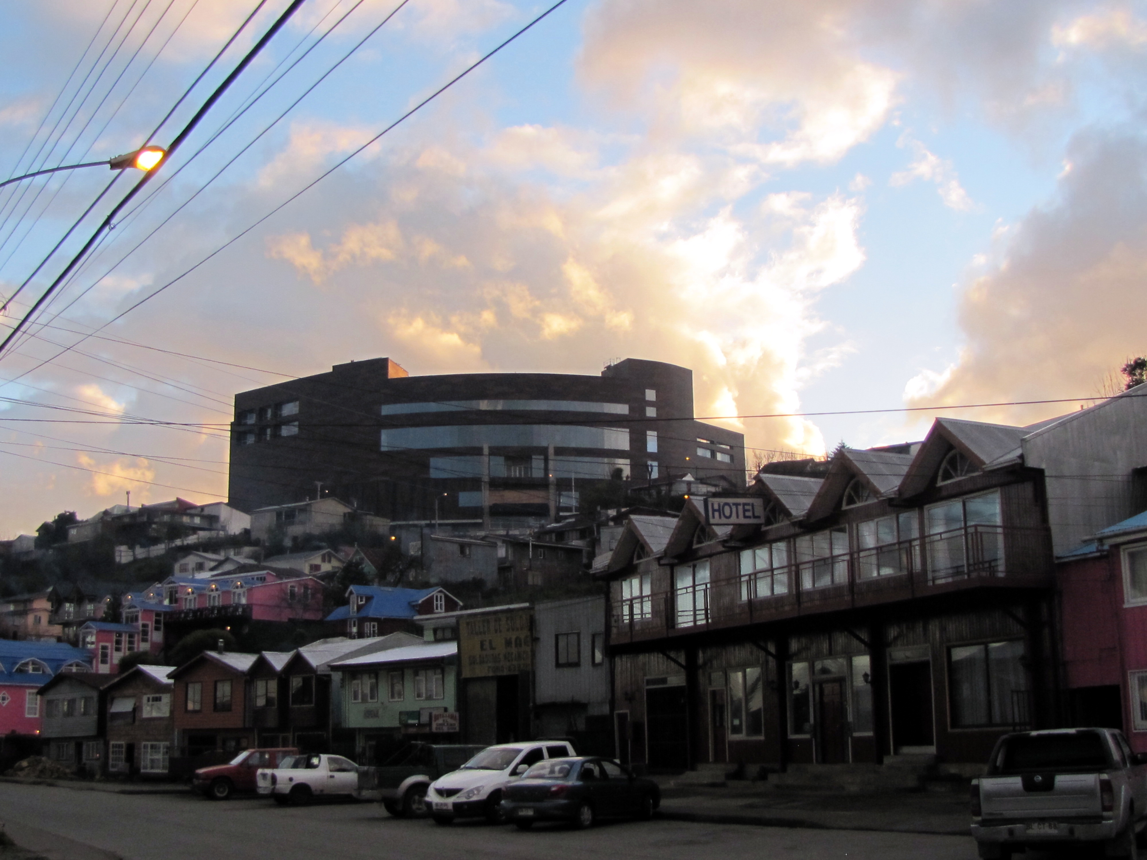 Mall Paseo Chiloé en construcción, visto desde la calle Pedro Montt. Castro, Chile.